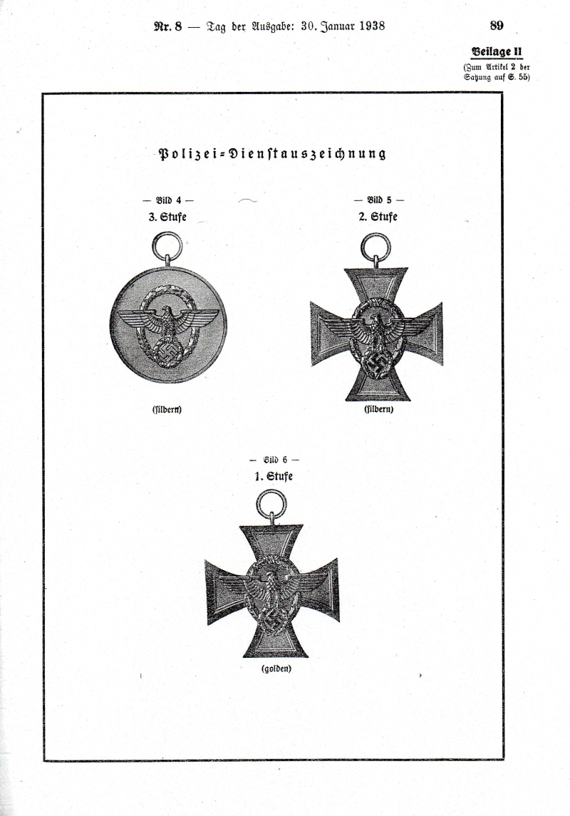 Anlage zur Polizei-Dienstauszeichnung (1938) Satzung mit Zeichnungen der Polizei-Dienstauszeichnung